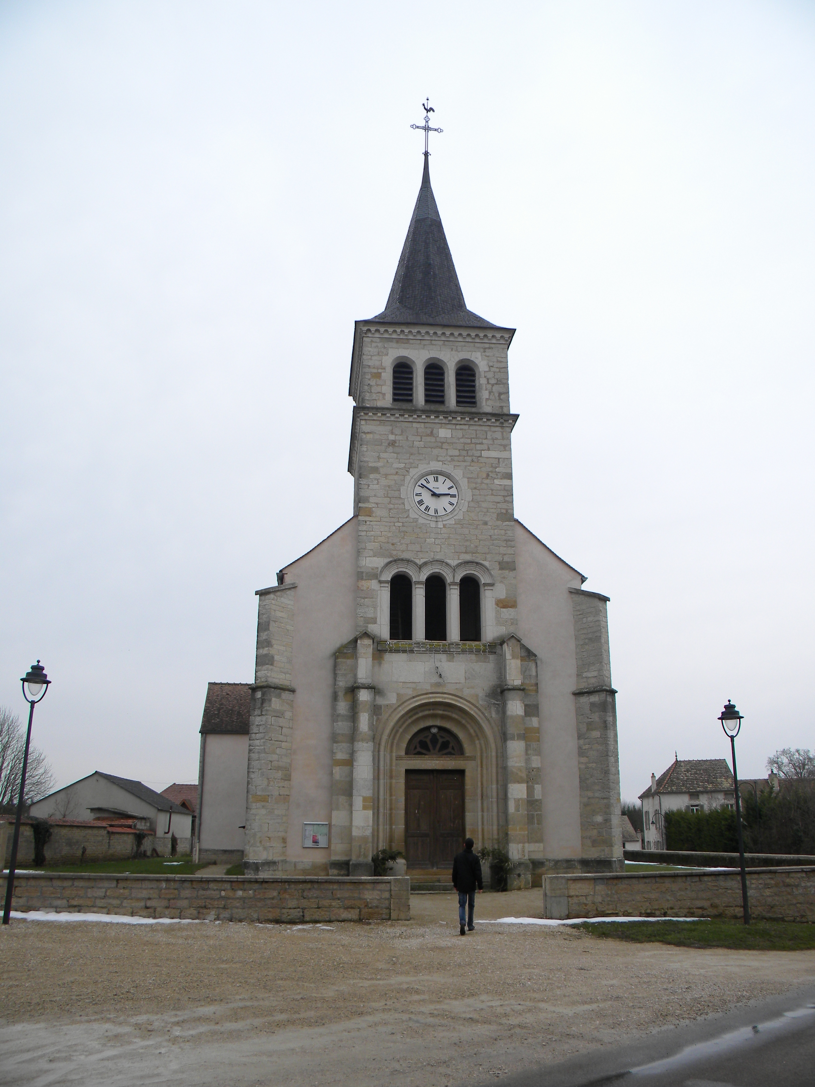 kirko de Meursanges